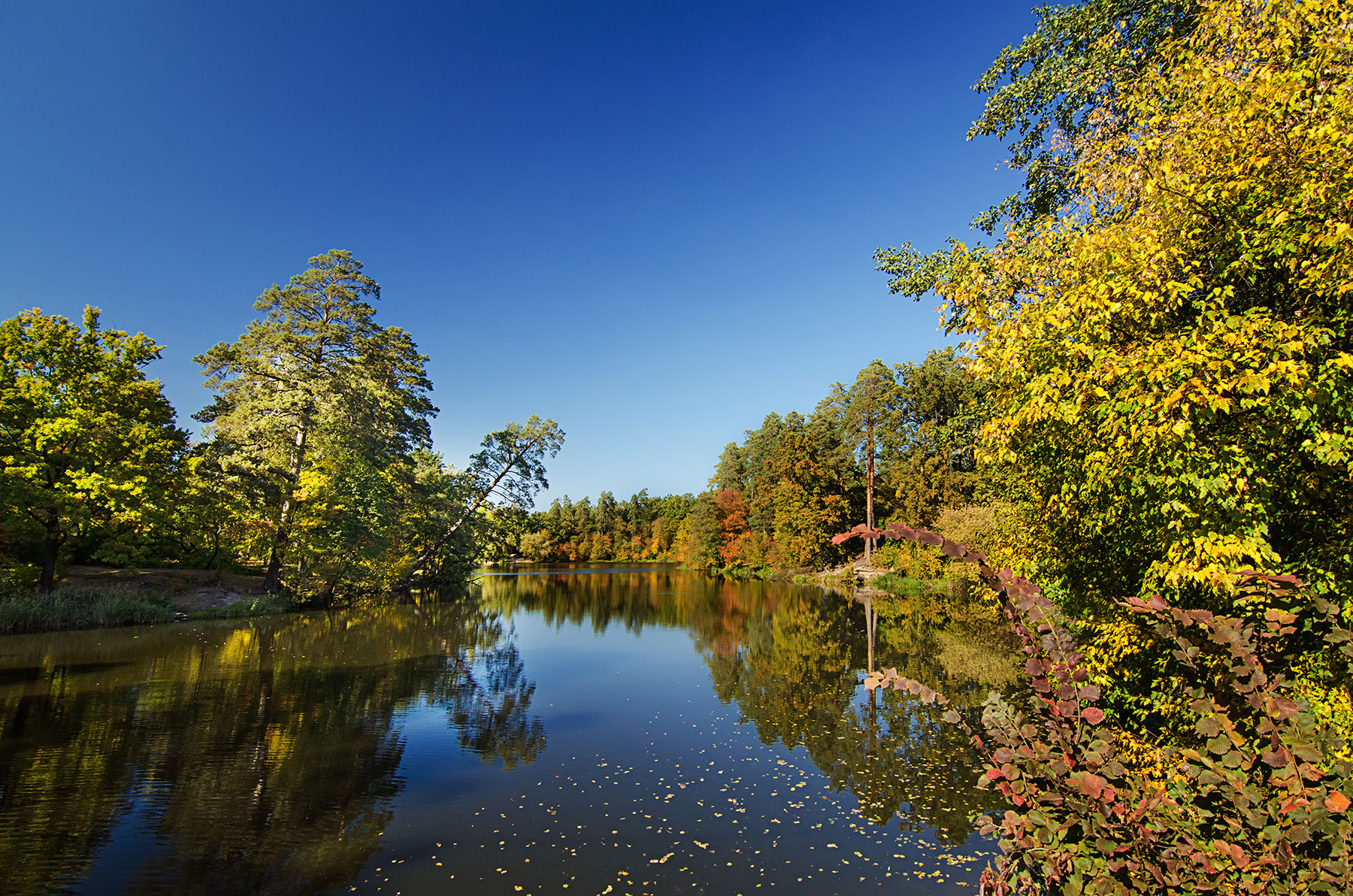 Пуща-Водицький лісопарк, Оболонський район